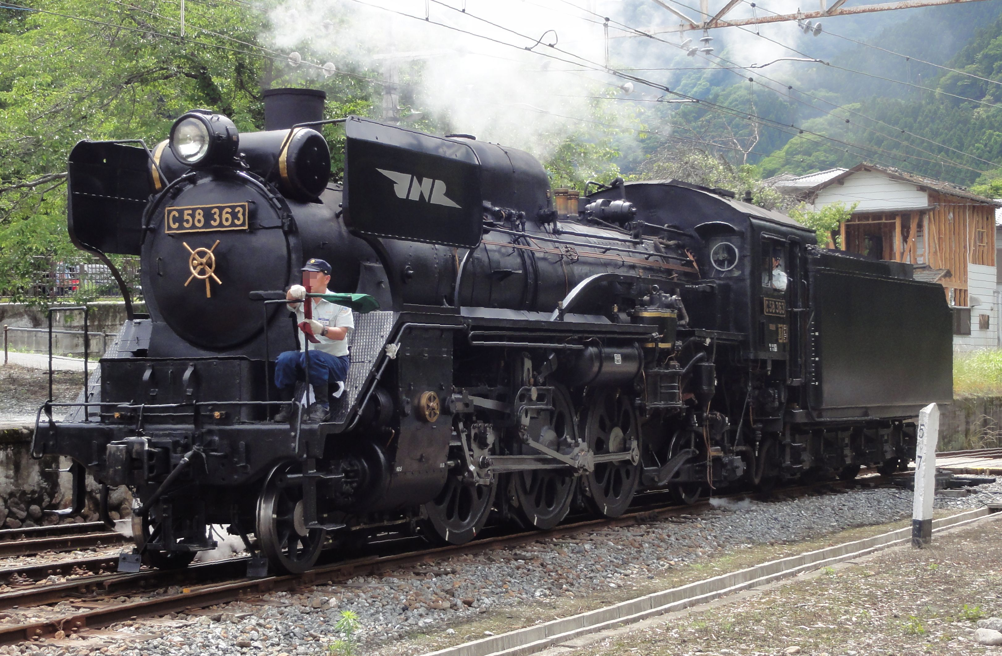 国鉄C58形蒸気機関車